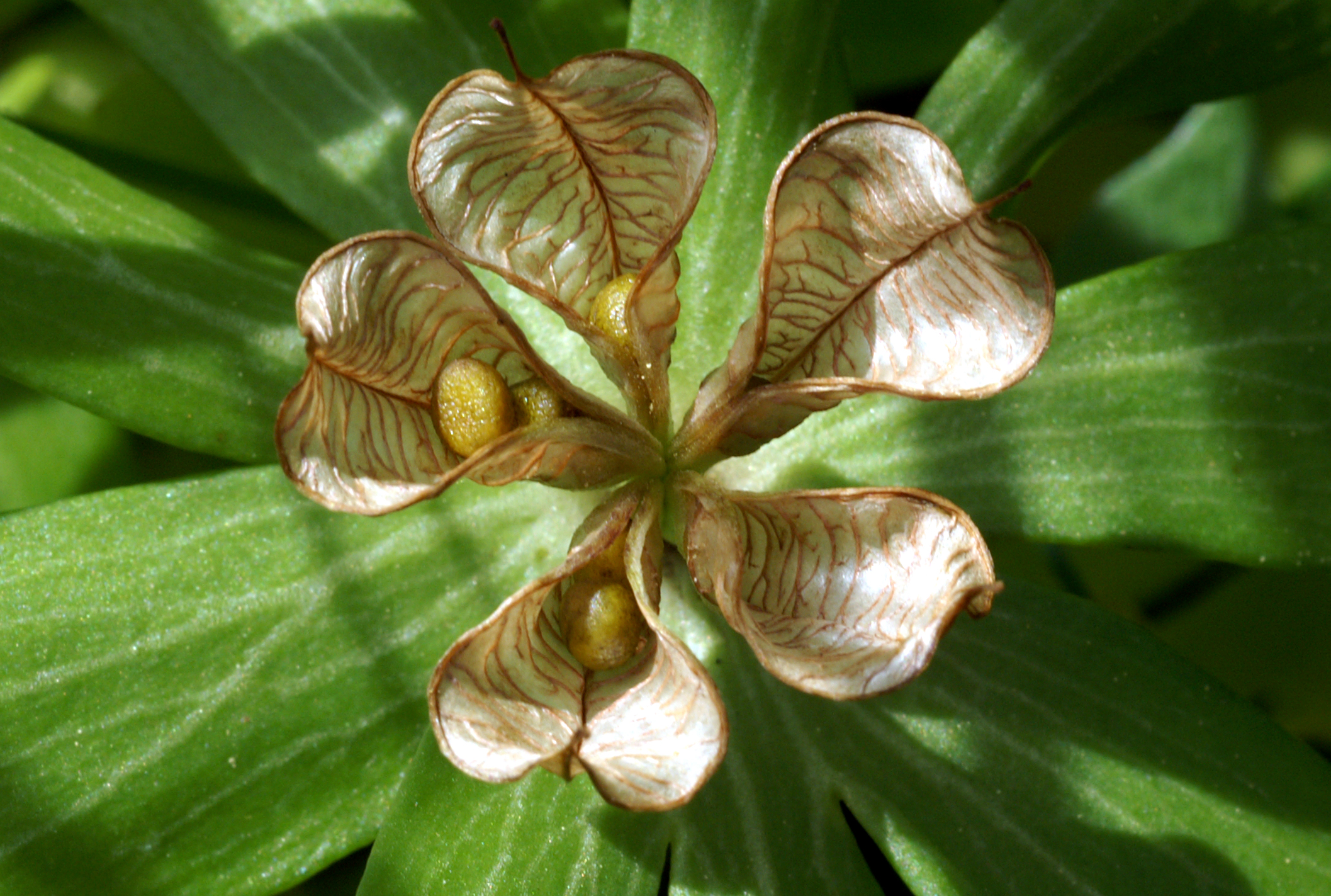 Winterling (Eranthis hyemalis), reifer Samenstand